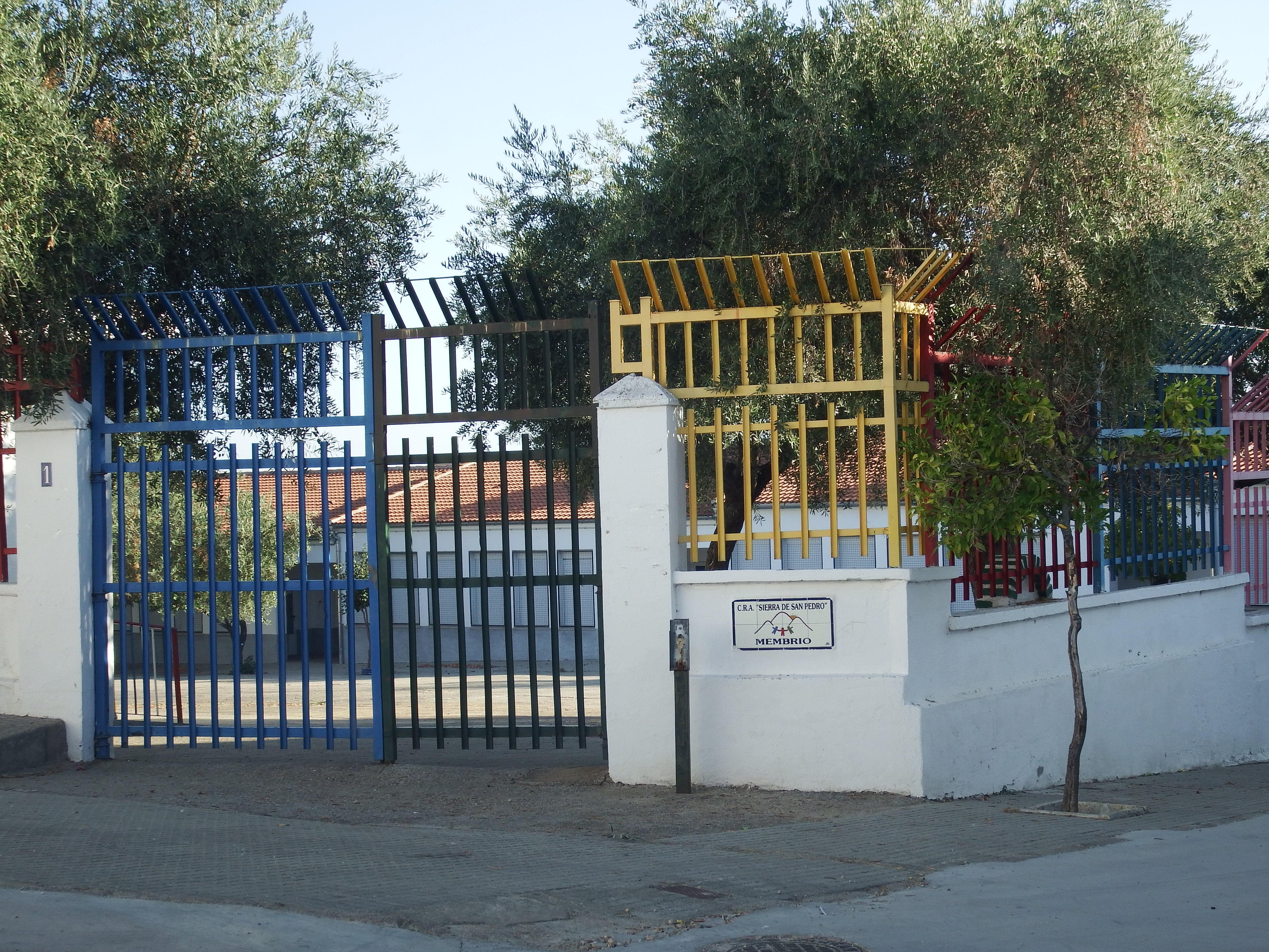 Membrío